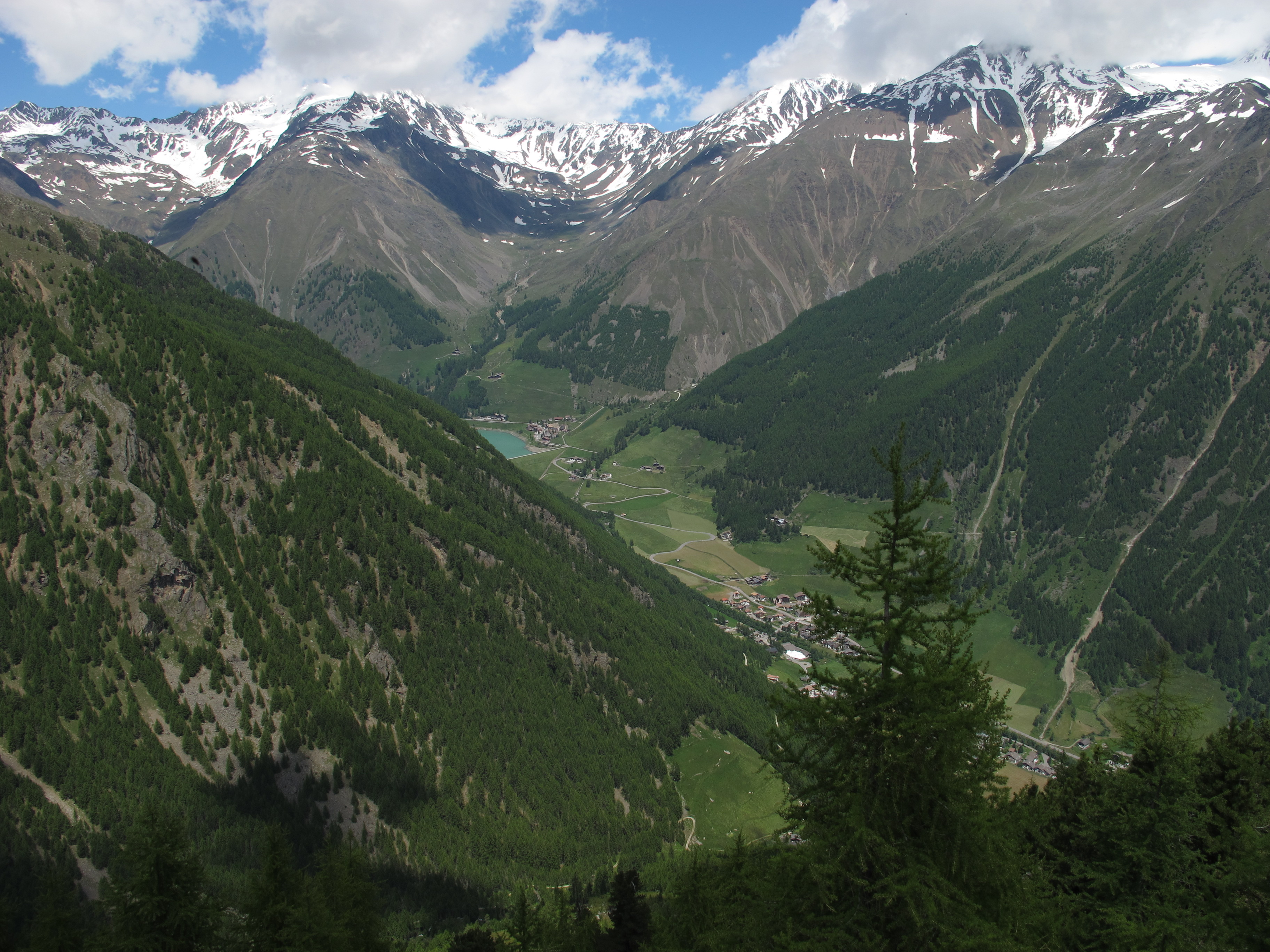 Schnalstal in Südtirol: unterhalb des Stausees, Blick auf Verjagt und Unser Frau